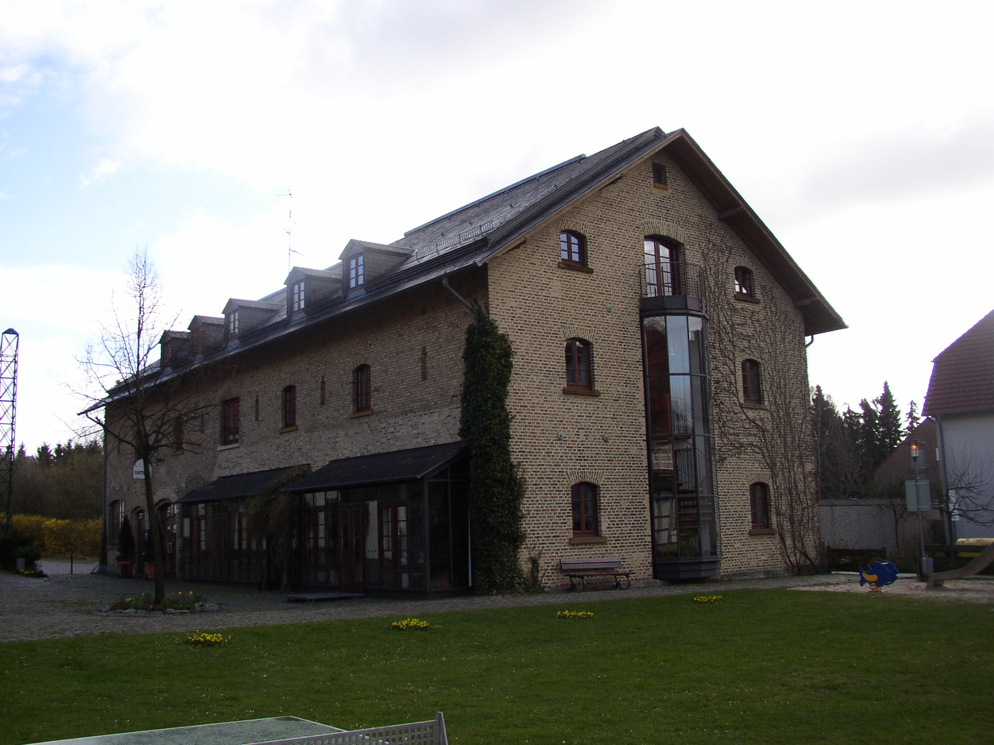 Remise, Halle (Westfalen)